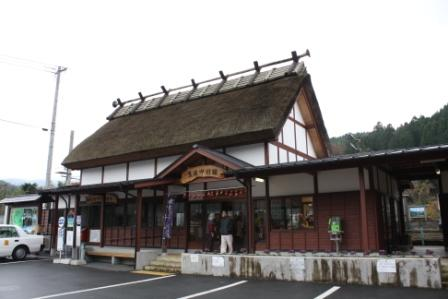 Bungo-nakamura Station